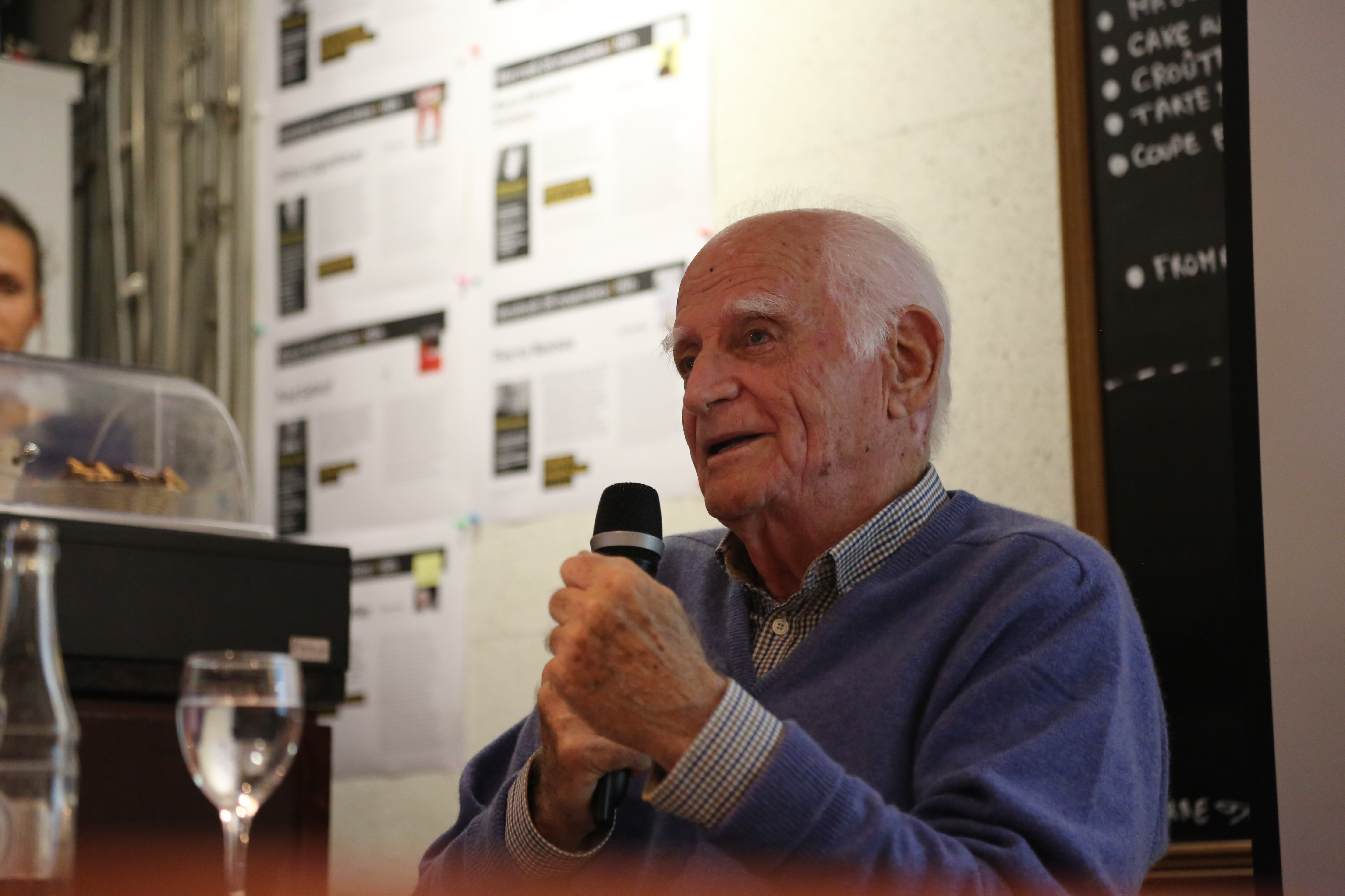 Michel Serres à la librairie Dialogues à Brest, Finistère, le 30 octobre 2014